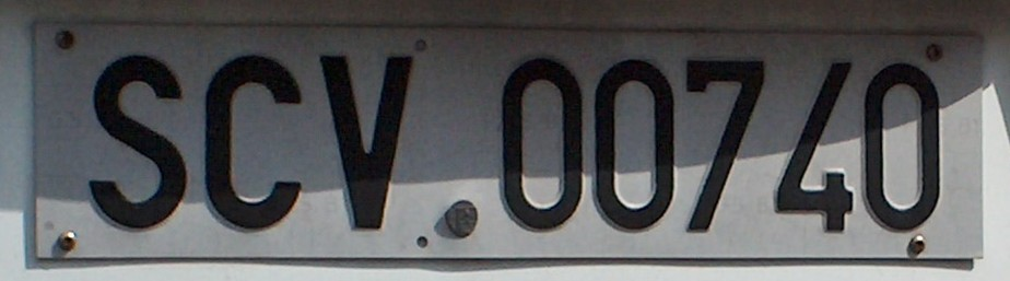 Kfz-Kennzeichen für Dienstfahrzeuge aus dem Vatikan selbstfotografiert, 2005